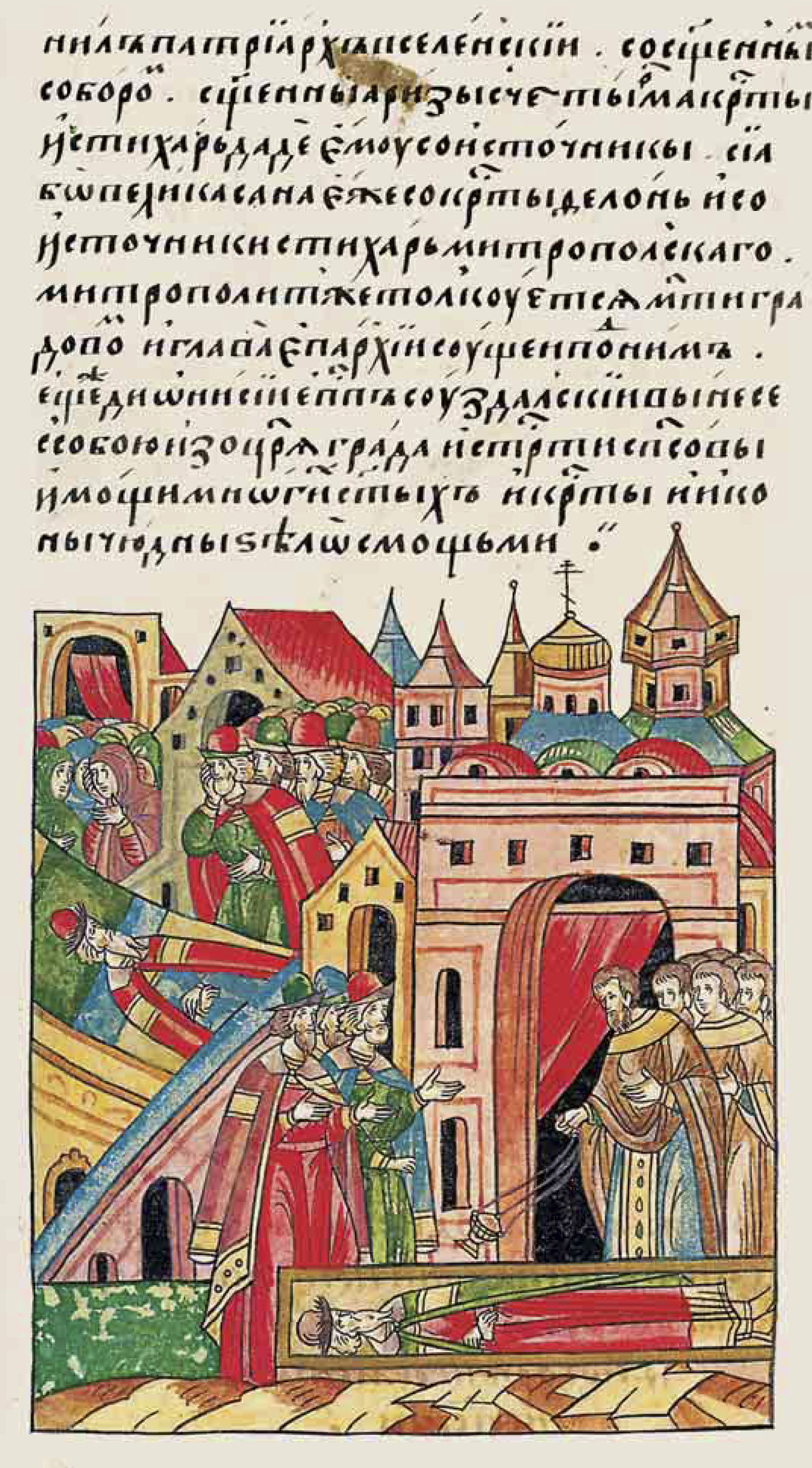 Лицевой летописный свод В том же году преставился князь Василий Михайлович Кашинский и положен был в соборной церкви Воскресения, в своей отчине, в городе Кашине, месяца мая в 6-й день.